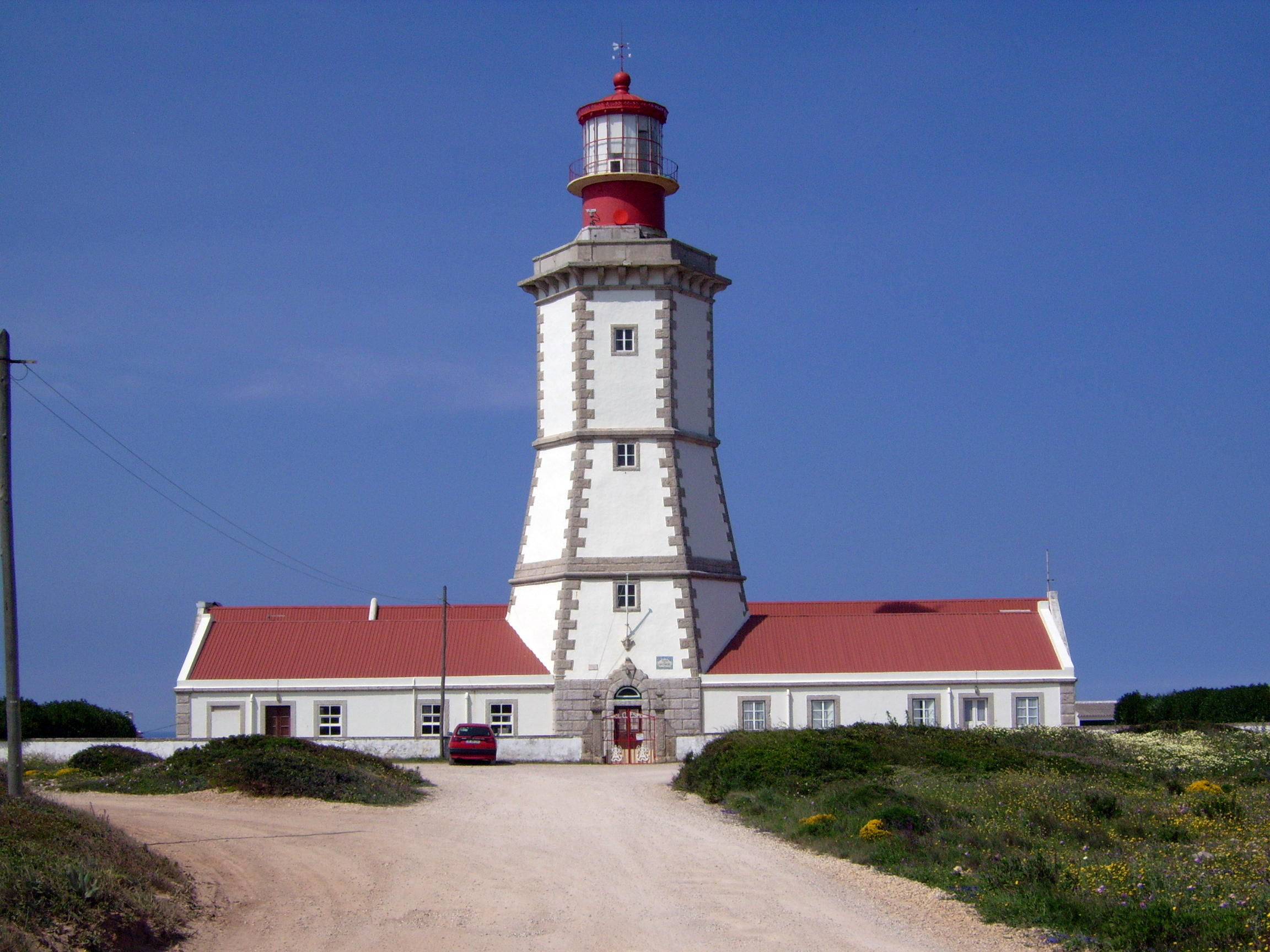 O Farol do Cabo Espichel data de 1790. Local : Cabo Espichel / Sesimbra / Portugal user:sacavem (pt) (usuário:sacavem)